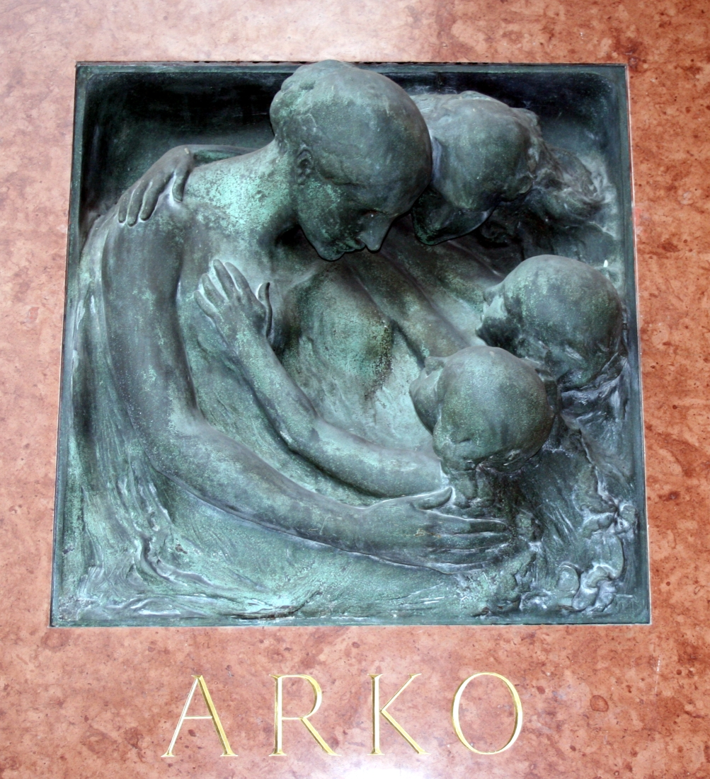 Spomenik Roberta Frangeša Mihanovića na grobu obitelji Arko, Mirogoj, Zagreb, Hrvatska